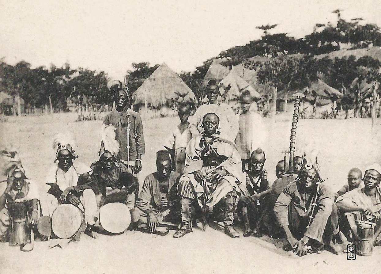 Orchestre d'un chef du pays de Kissi. Logo SFE (Société française d'électrographie) Colonies françaises. Haute-Guinée.